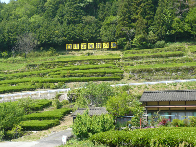 岐阜県加茂郡東白川村五加地区の茶畑。同地区は白川茶発祥の地である